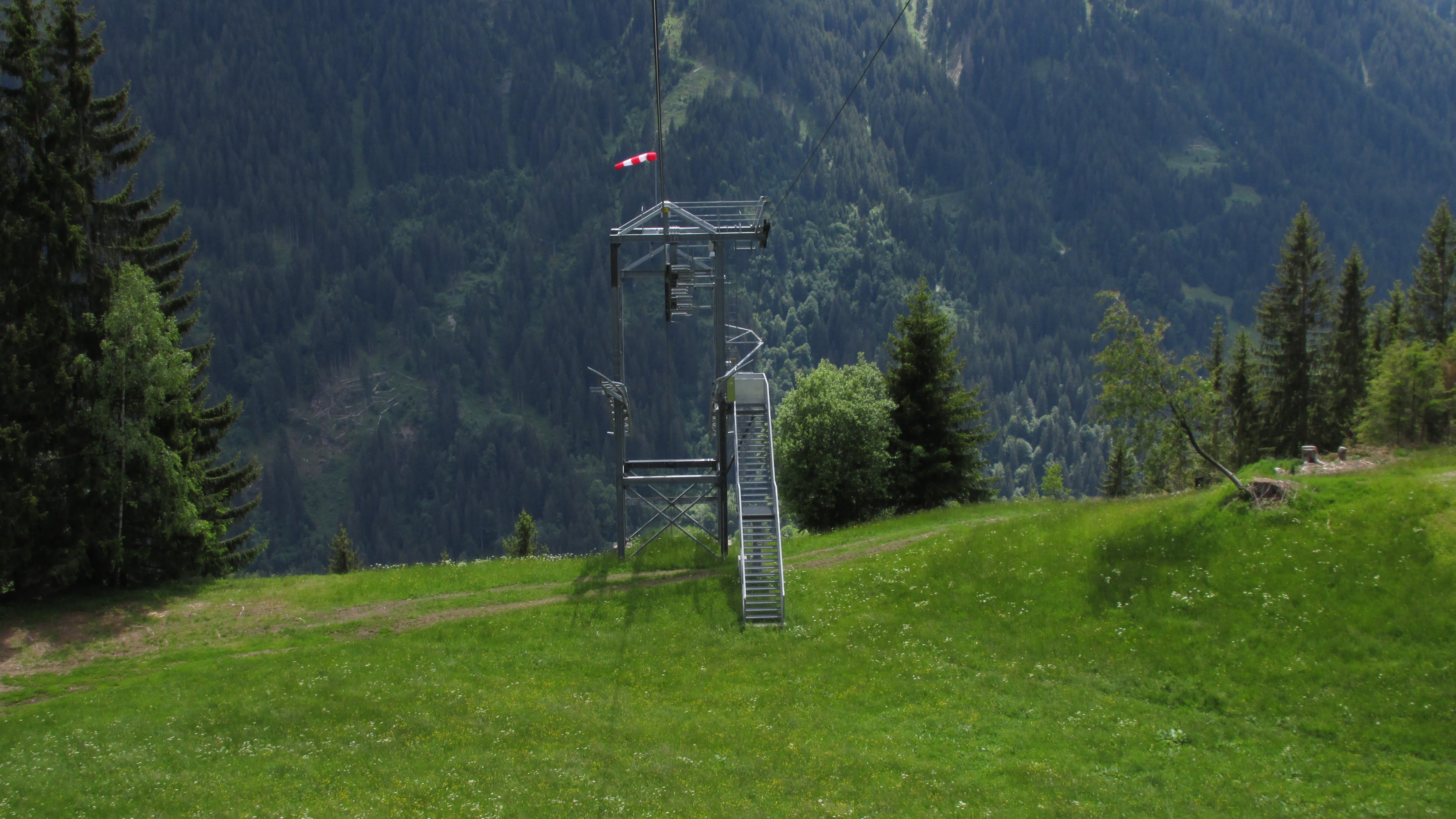 Eine der Zwischenstationen der Kristbergbahn mit hydraulisch ausklappbarer Zugangsplattform